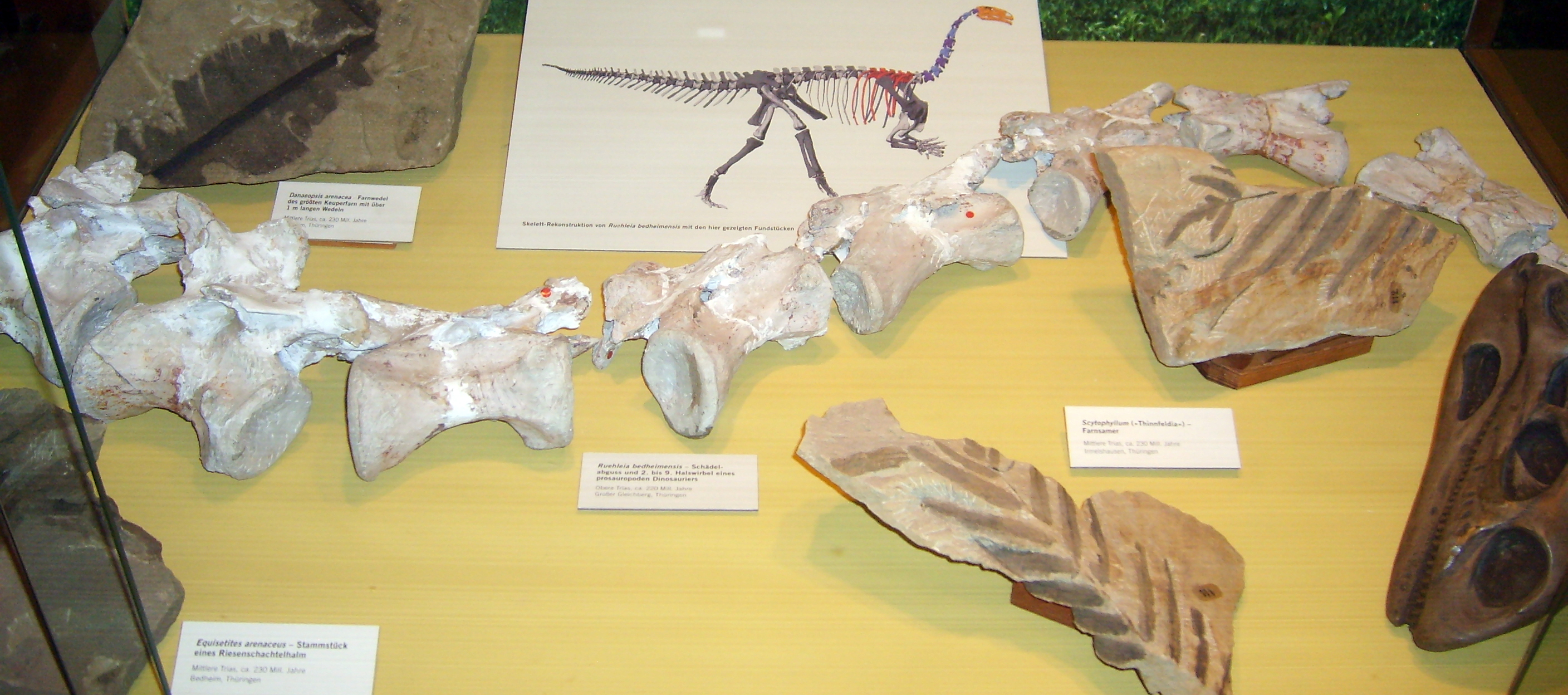 Ruehleia bedheimensis neck vertebrae, Naturkunde Museum, Berlin.